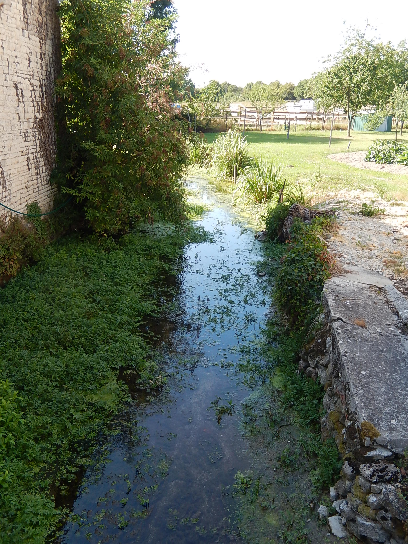 La rivière Nie, dans le village de Moulin Neuf, marque la limite entre la commune de Fontenet (à gauche) et celle de Varaize (à droite).